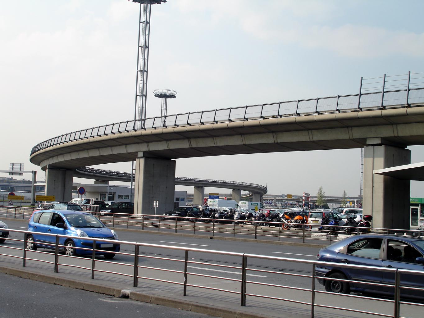 Orlyval, viaduc en courbe Orly-Sud à Orly-Ouest